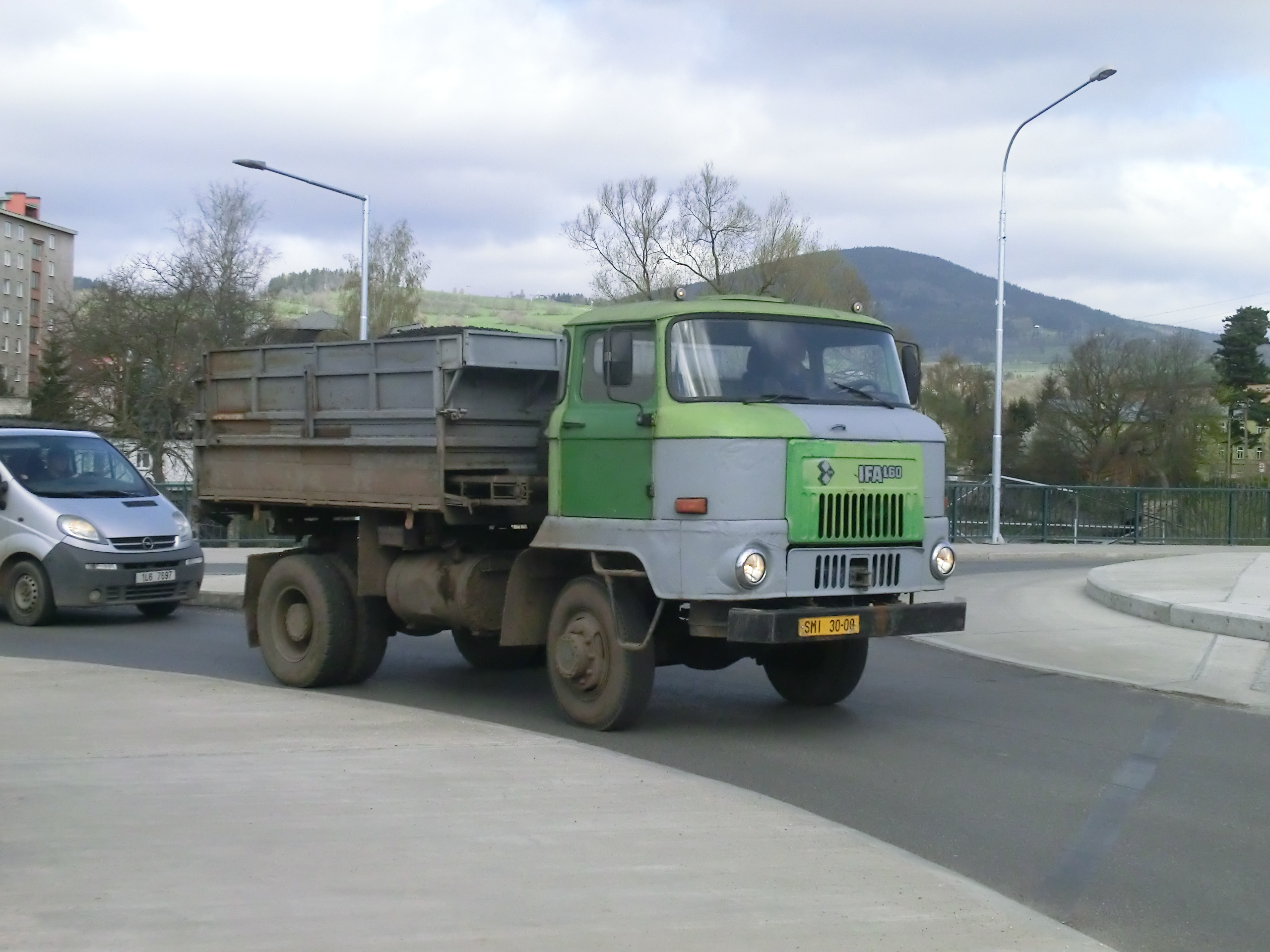 Uhlířská IFA L60 projíždí Vrchlabím.